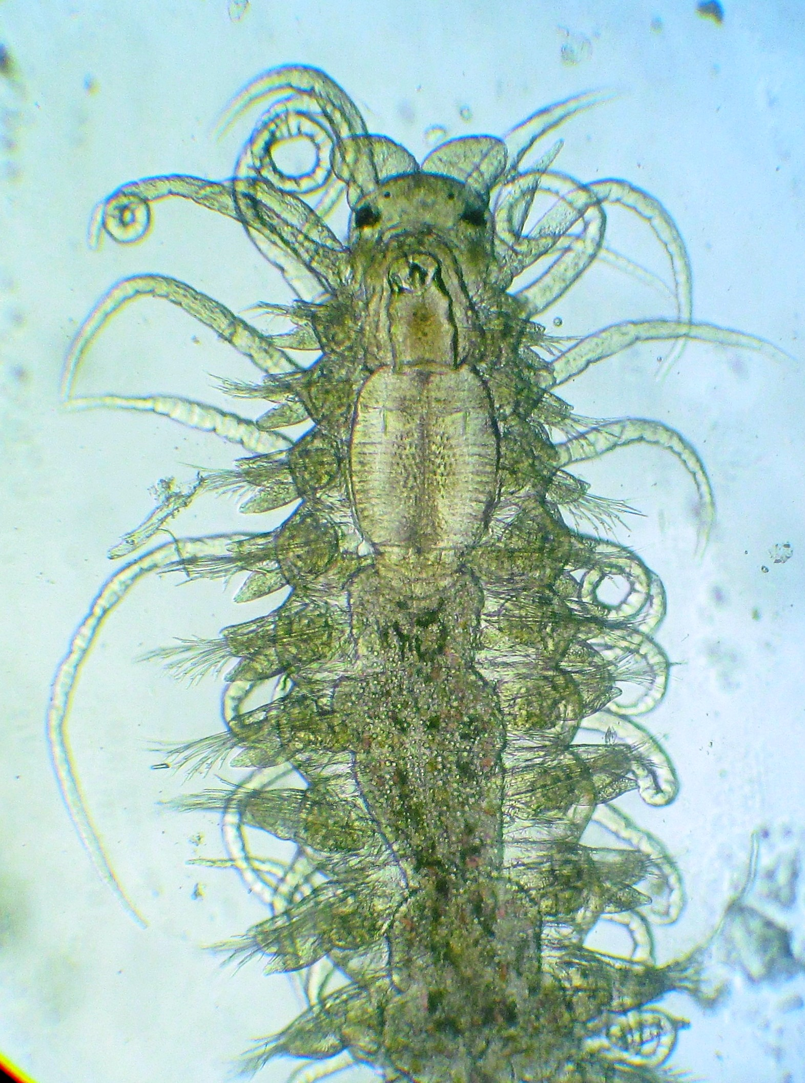 Nudisyllis pulligera, Calafuria (LI), mesolitorale